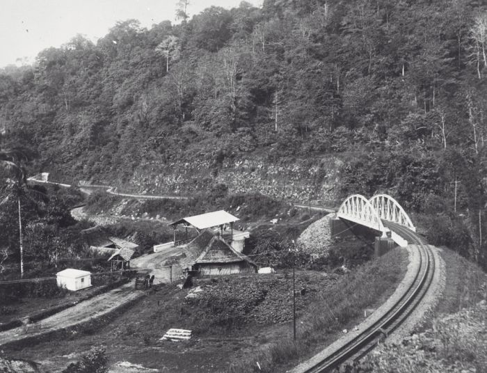 Foto. De spoorlijn door de Kloof van de Anei bij Fort de Kock, Sumatra